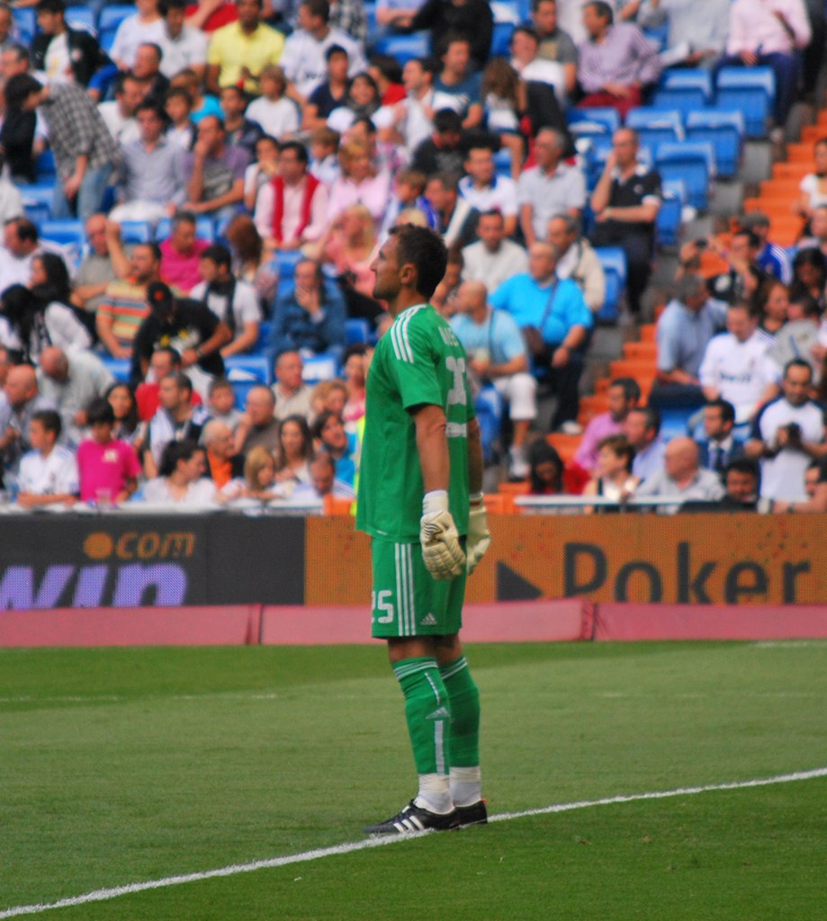 Jerzy Dudek durant de son dernier match, lors d'un match entre le Real Madrid et l'UD Almería.